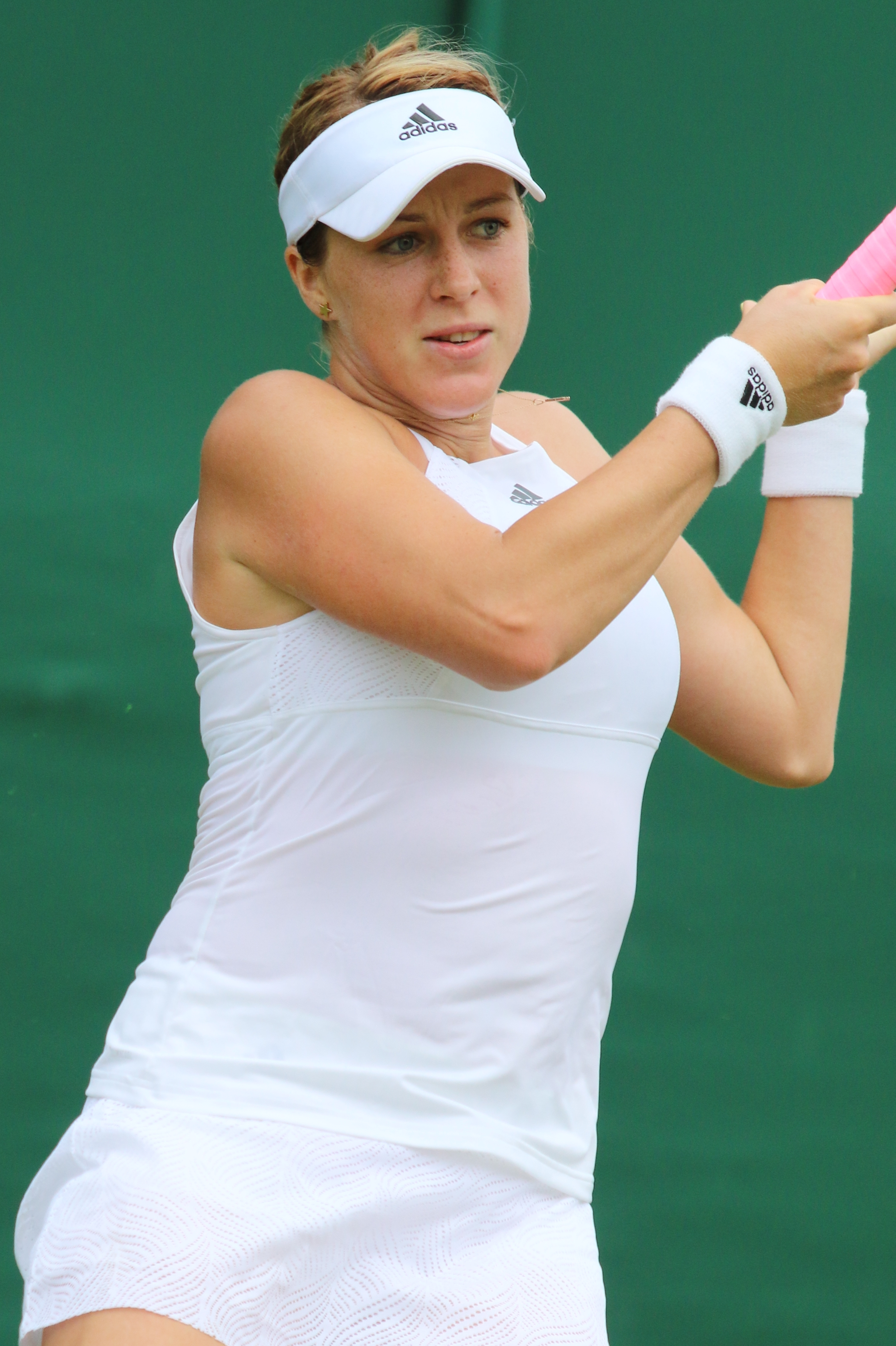 Pavlyuchenkova WM17 (1)